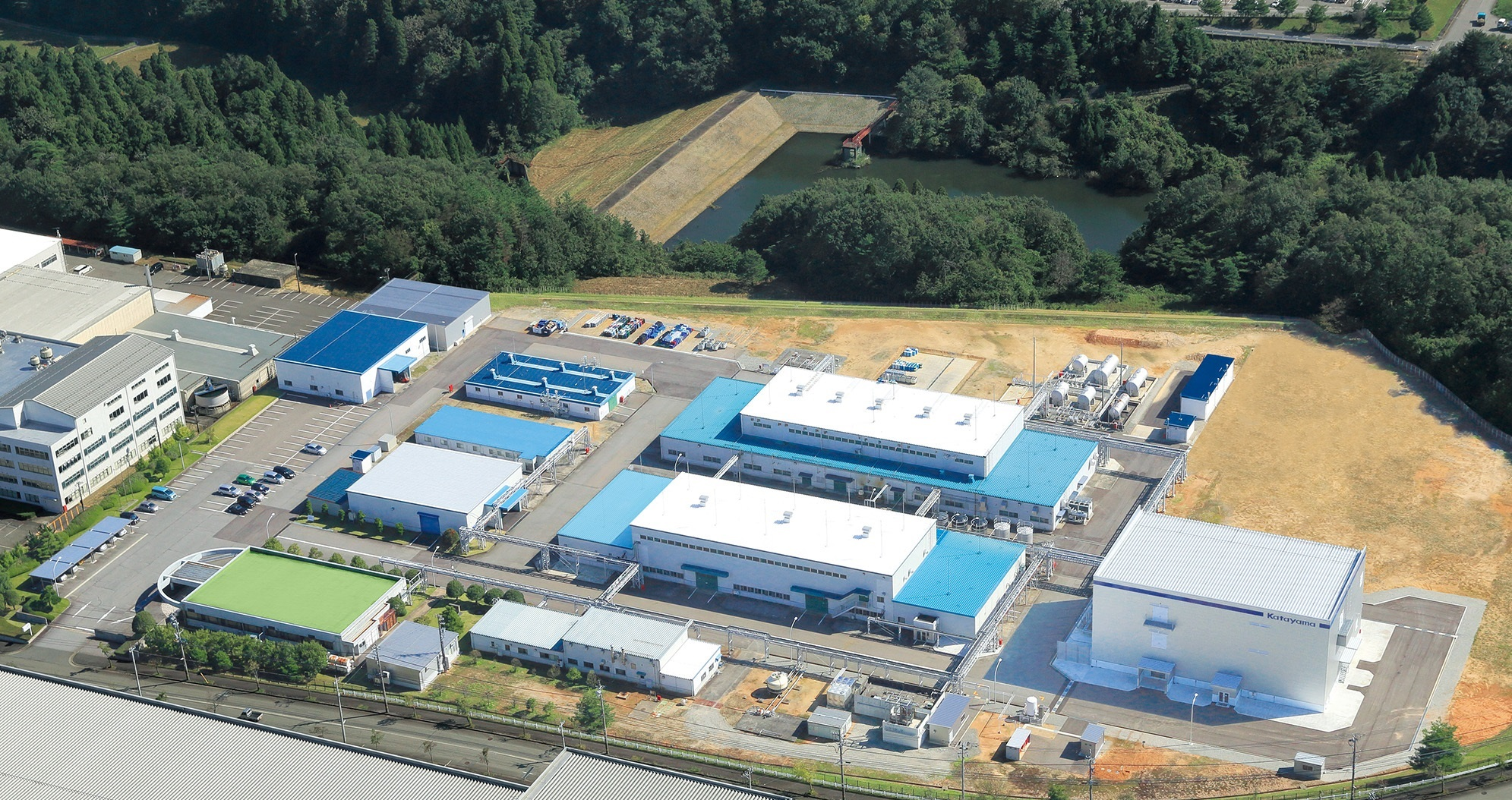 富山工場 空撮